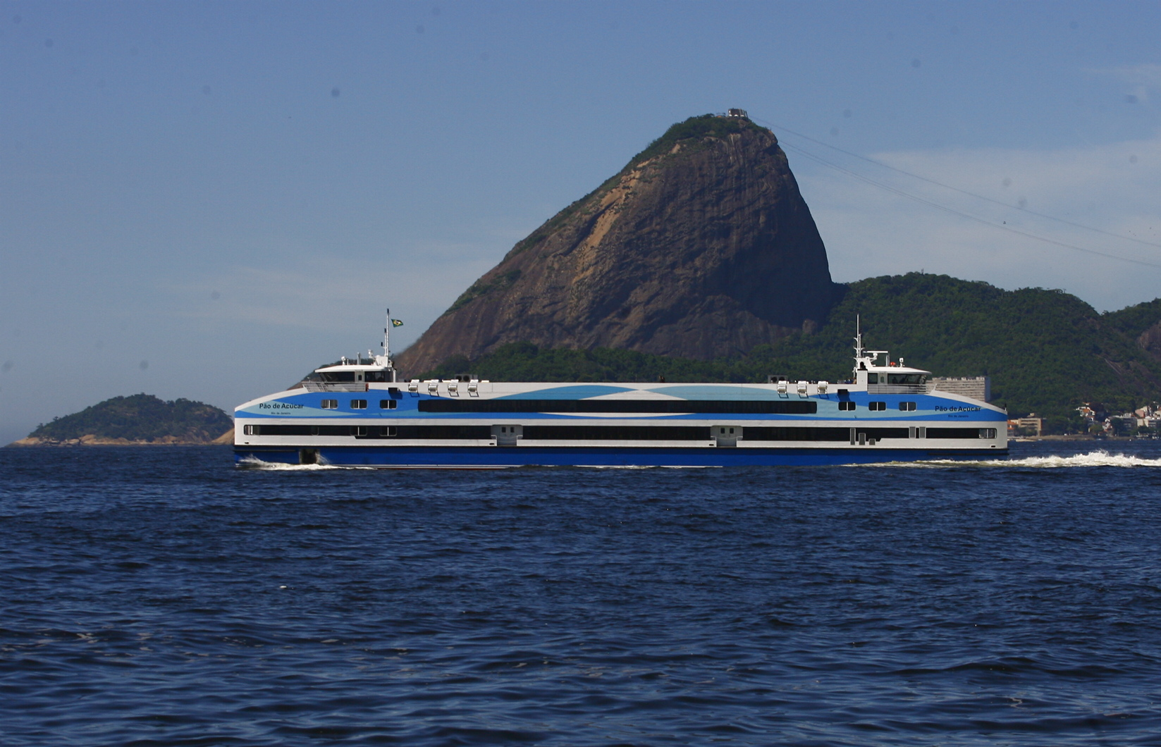 Nova barca realiza primeiro teste de mar.